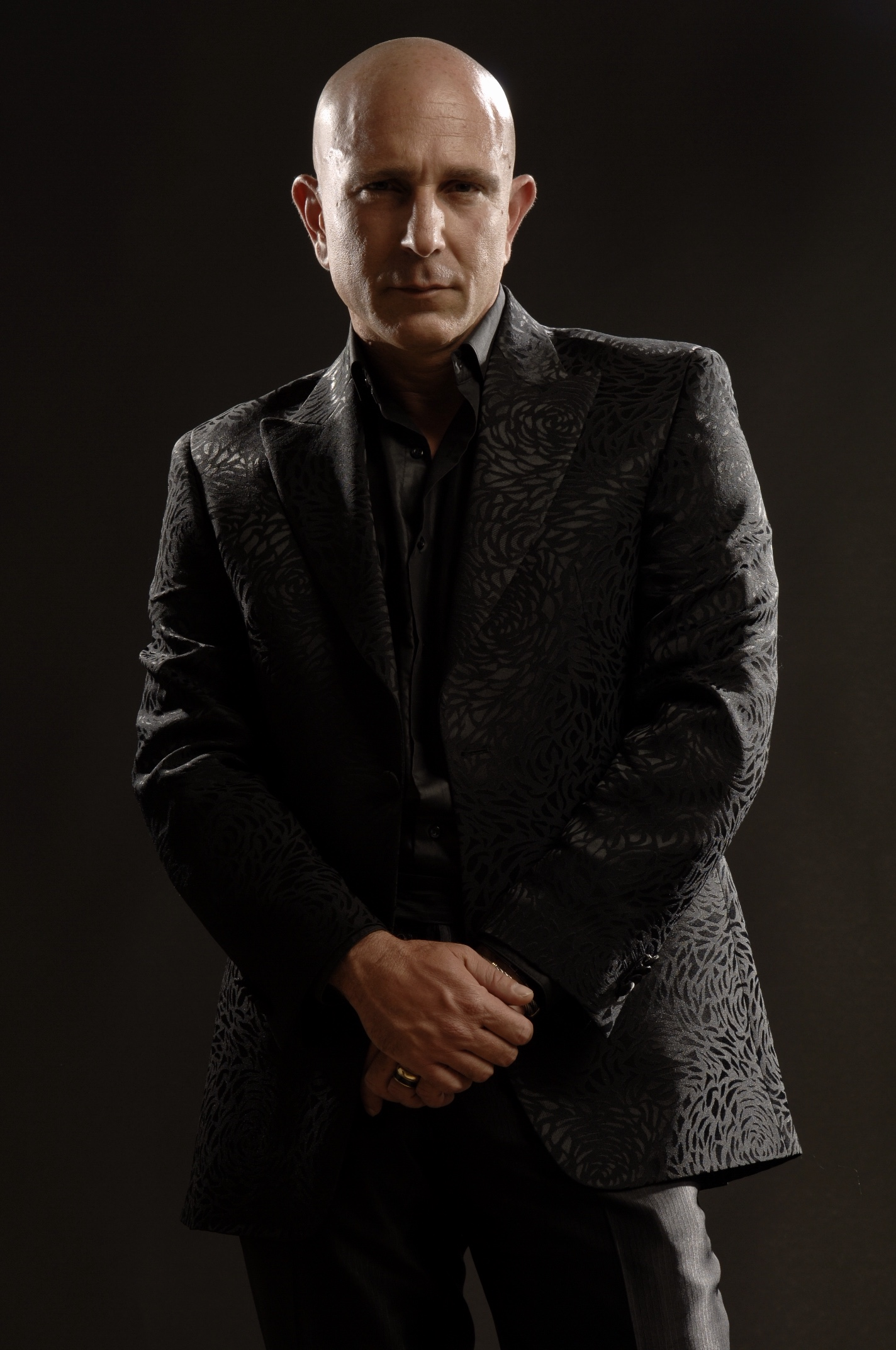 עופר אקרלינג